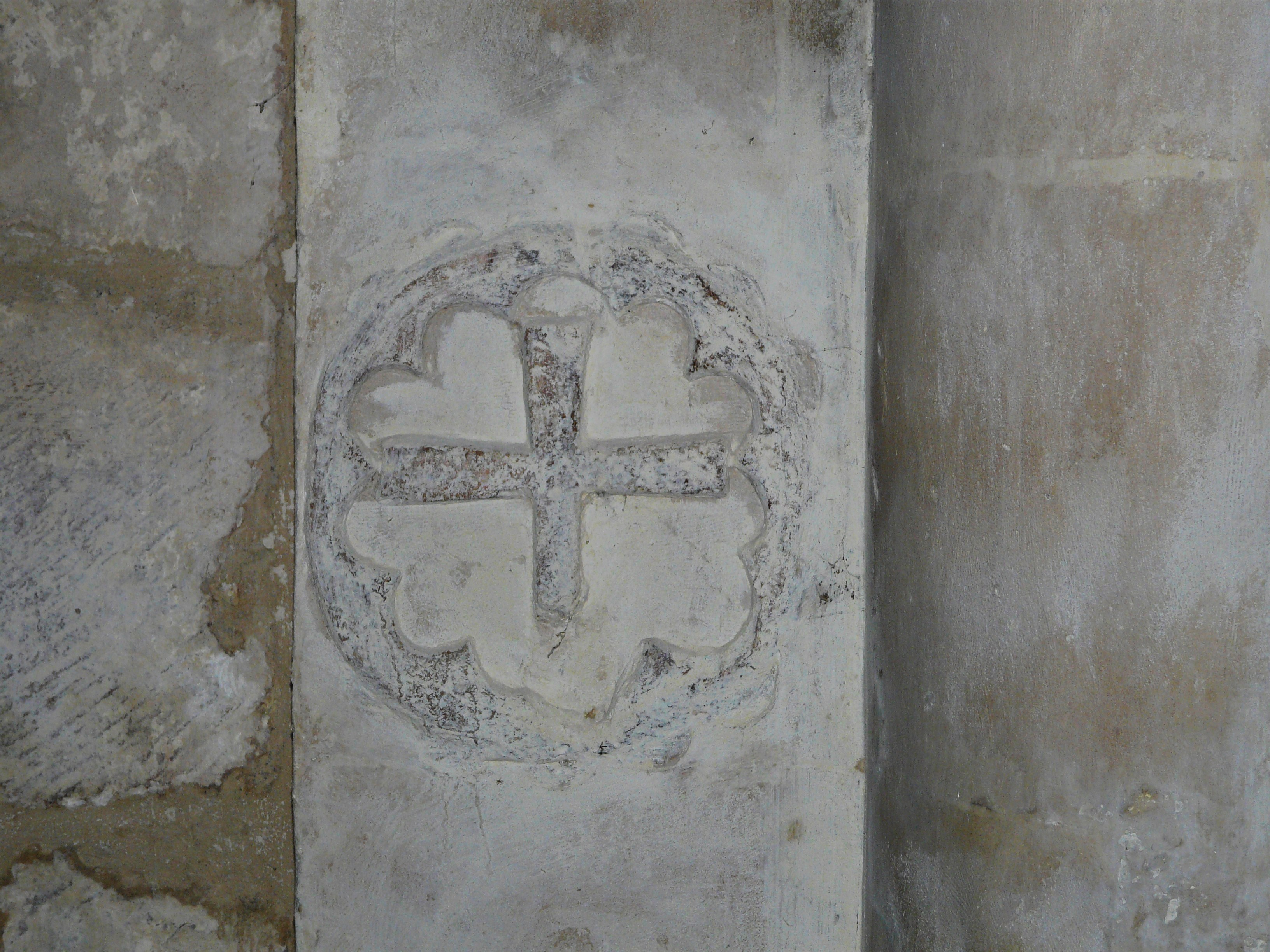 Croix de consécration sculptée dans l'église Saint-Timothée, Paussac-et-Saint-Vivien, Dordogne, France.